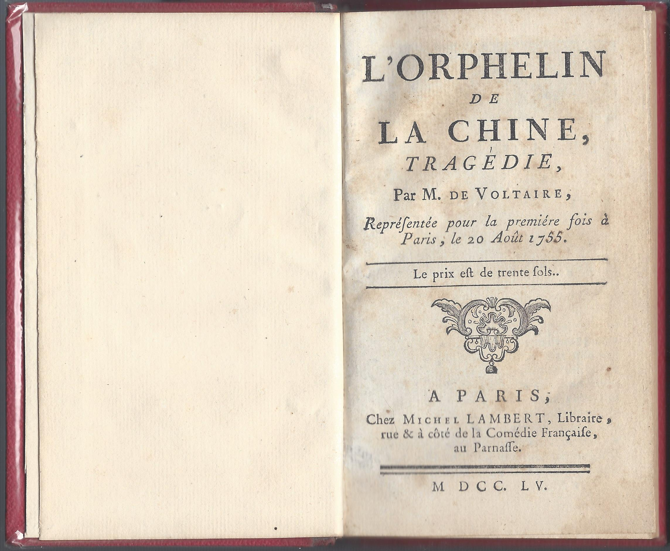 Titelseite von Voltaires: L'Orphelin de la Chine, Michel Lambert, Paris, August 1755